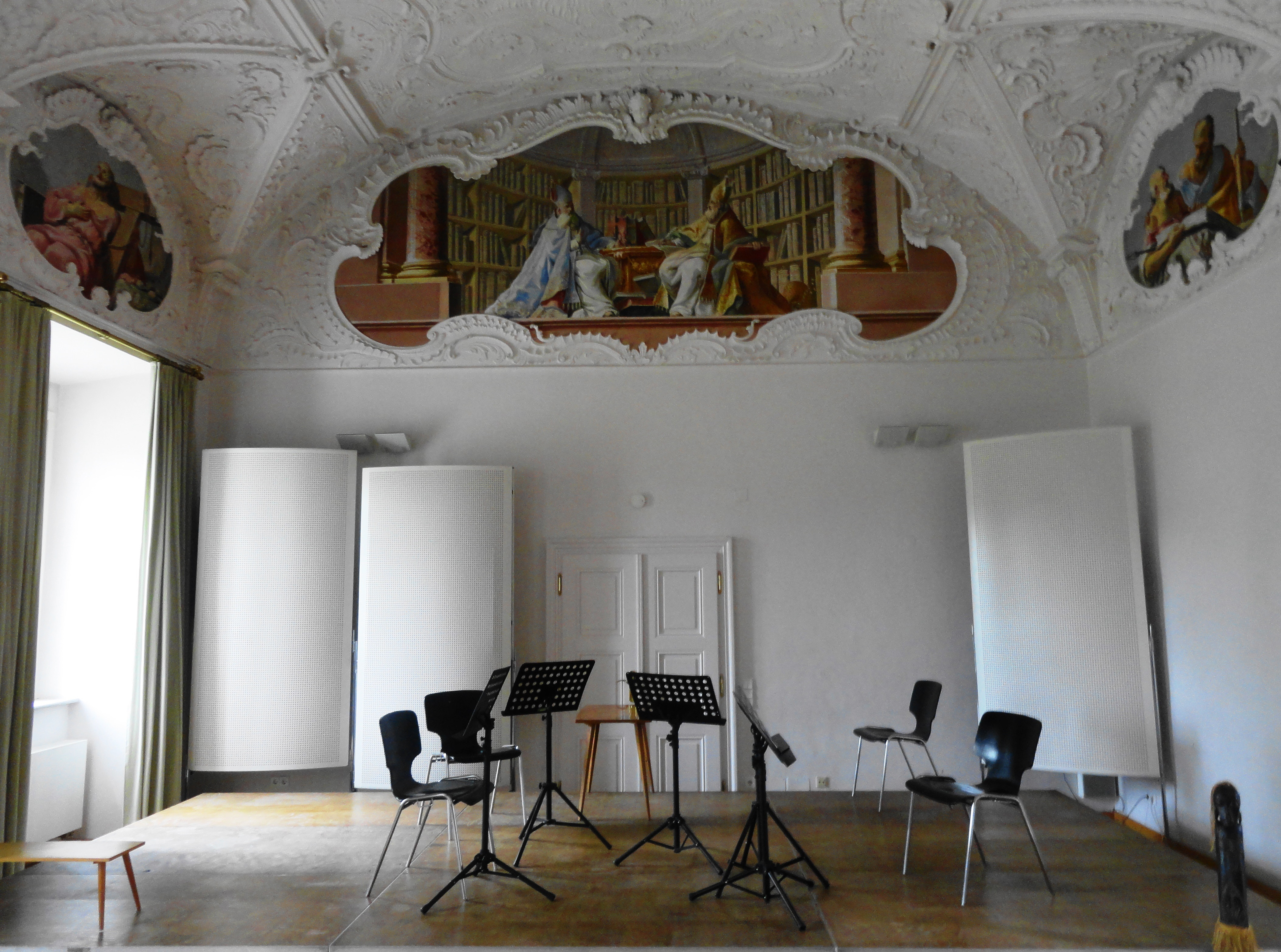 Musikzimmer BRG Bundesrealgymnasium Klagenfurt-Viktring, Kärnten, Österreich, EU